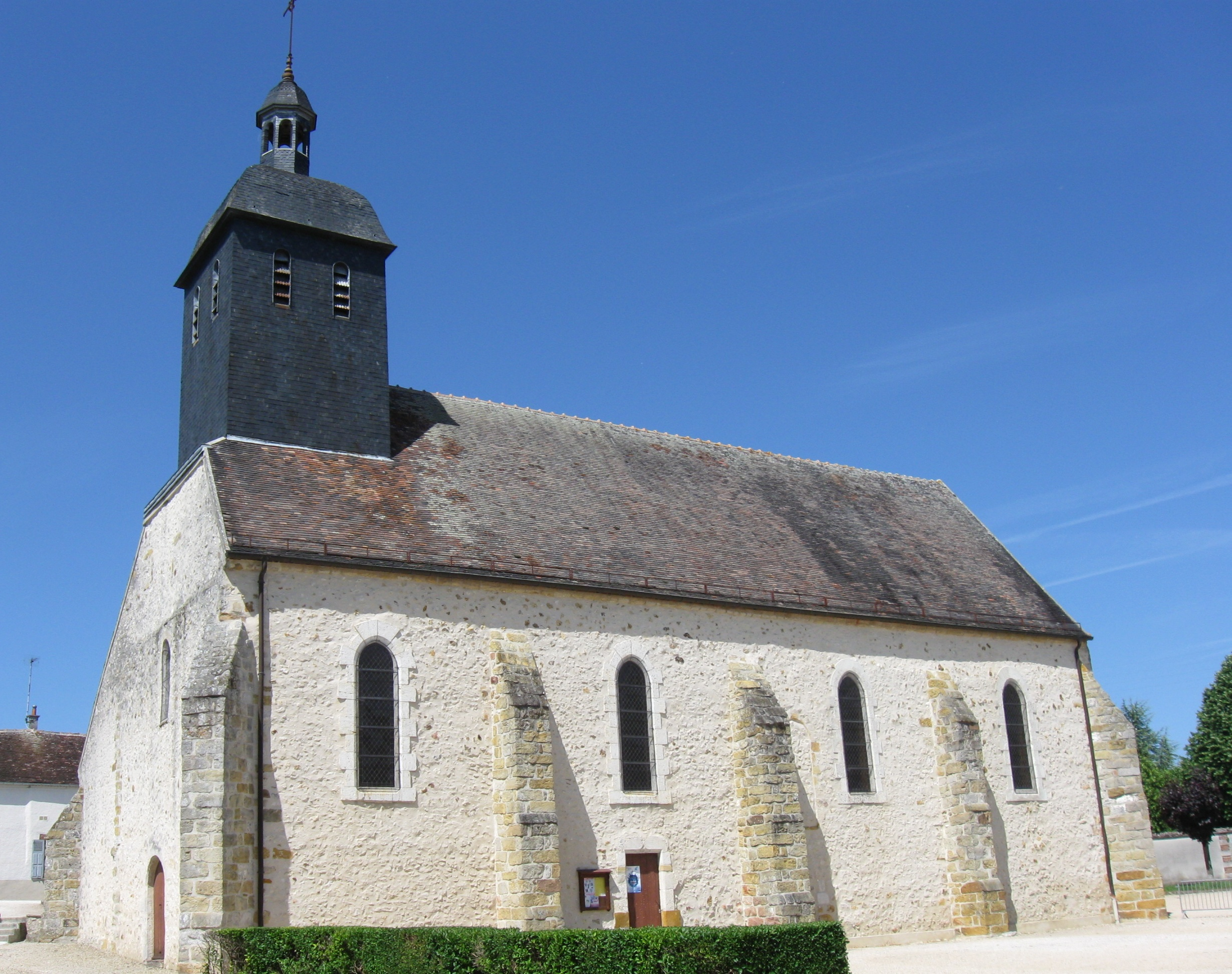 Église Notre-Dame des Ormes-sur-Voulzie. (Seine-et-Marne, région Île-de-France).